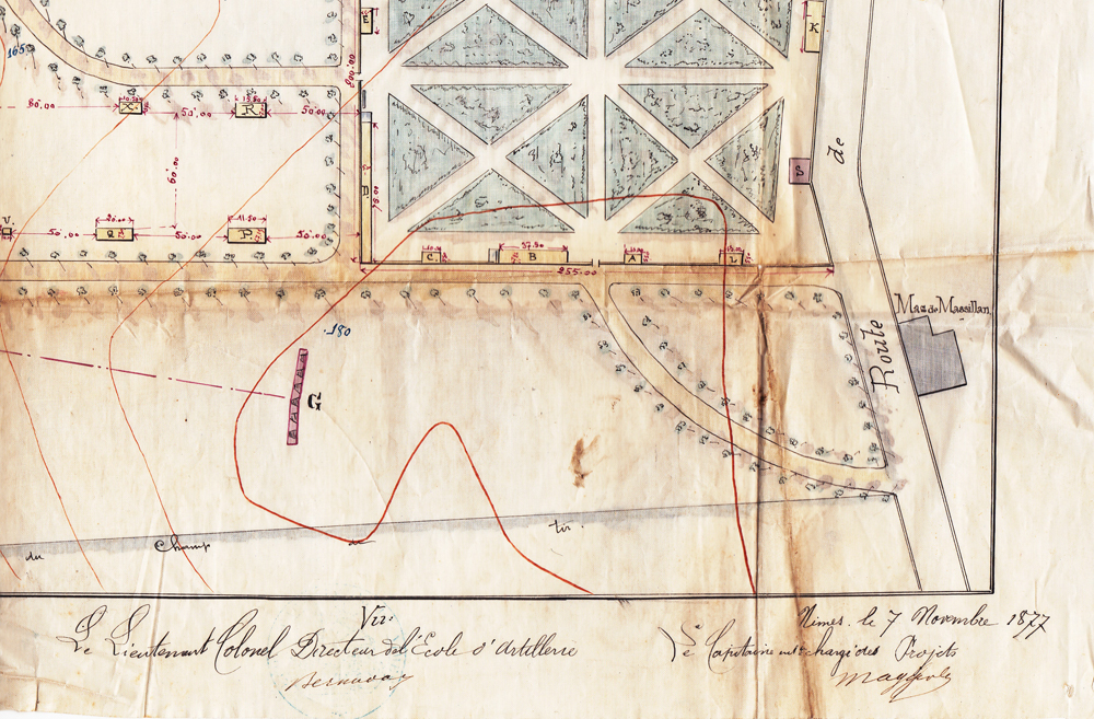 Ceci est un extrait d'une copie du projet du camp des Garrigues. Ce plan avait été exécuté en 1877.